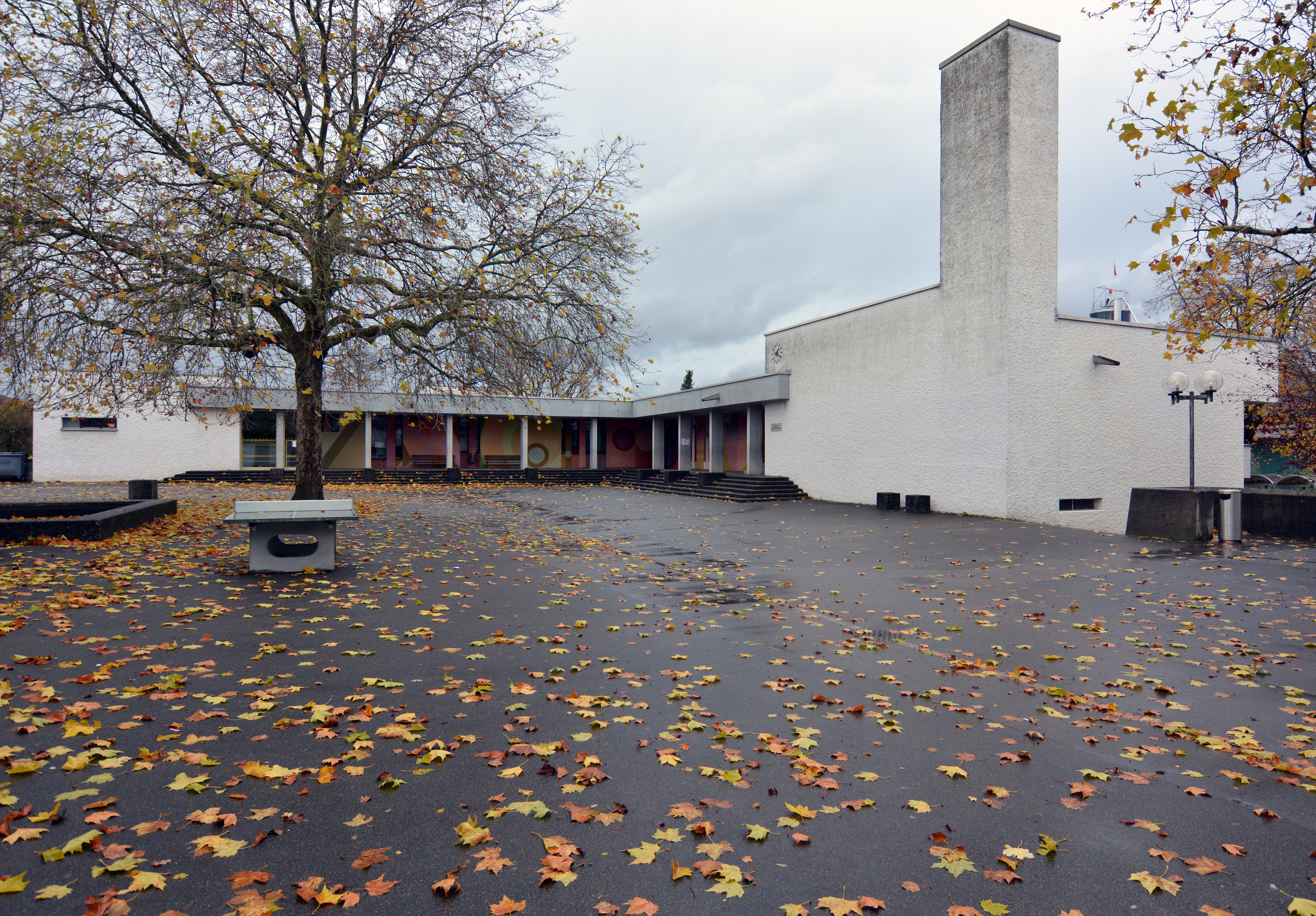 Das Primarschulhaus Im Fondli, Dietikon, 1962–65. L-förmiger Zentrumsbau. Singsaal, Lehrerzimmer und Hort. Architekten: Rudolf und Esther Guyer